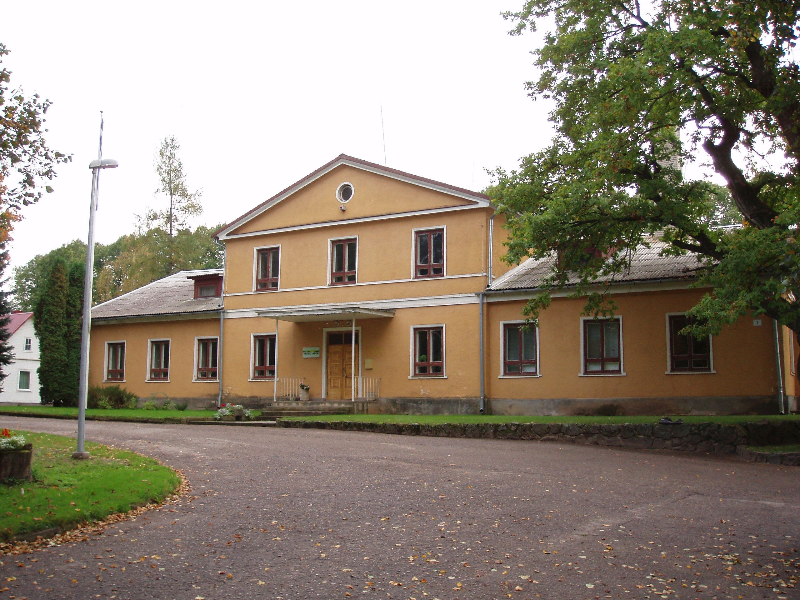 Ilmatsalu mõisa peahoone 2006. aastal.